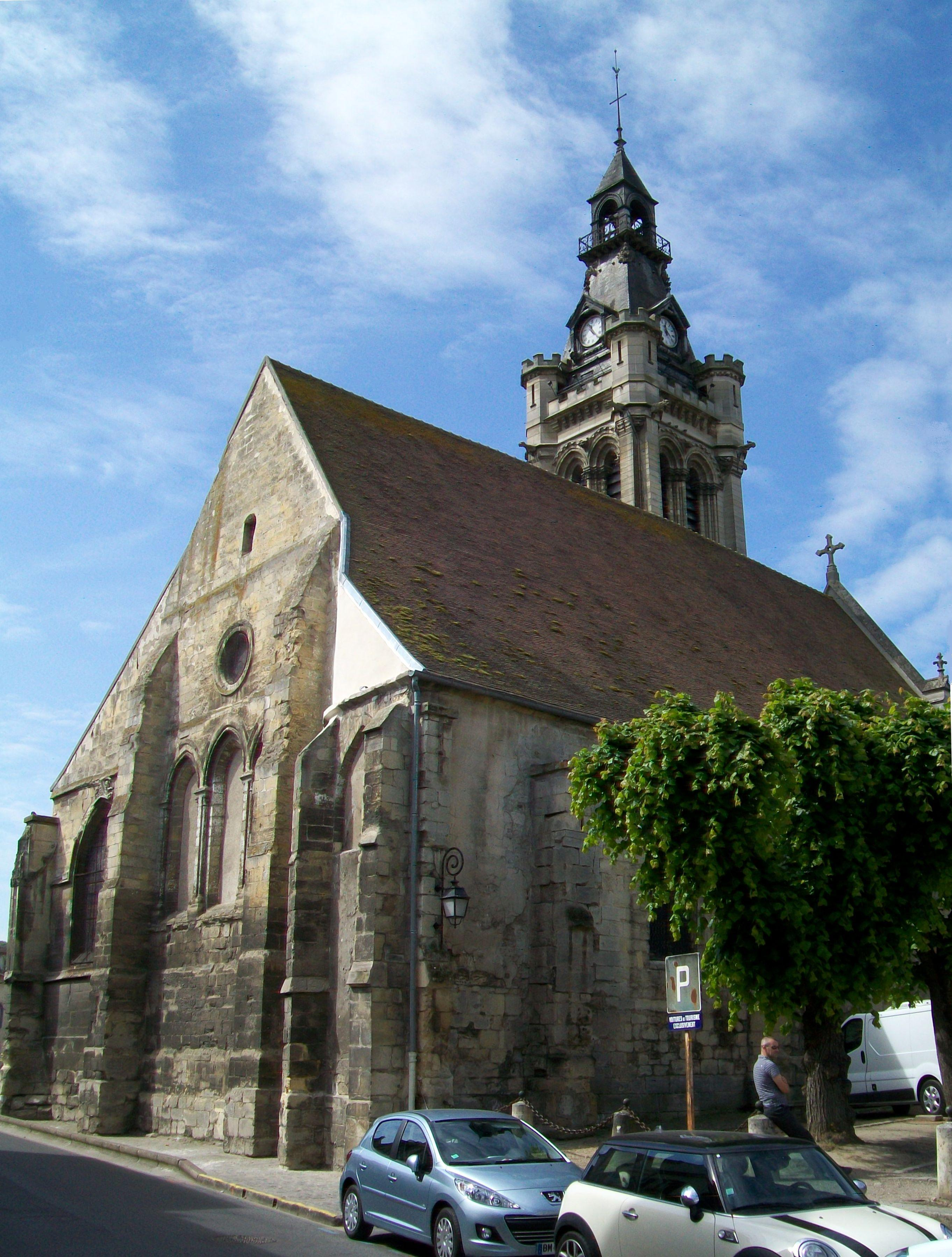 Le chevet de l'église, donnant sur la rue de Paris (D 909z) ; c'est la partie la plus ancienne de l'église avec le bas-côté nord.